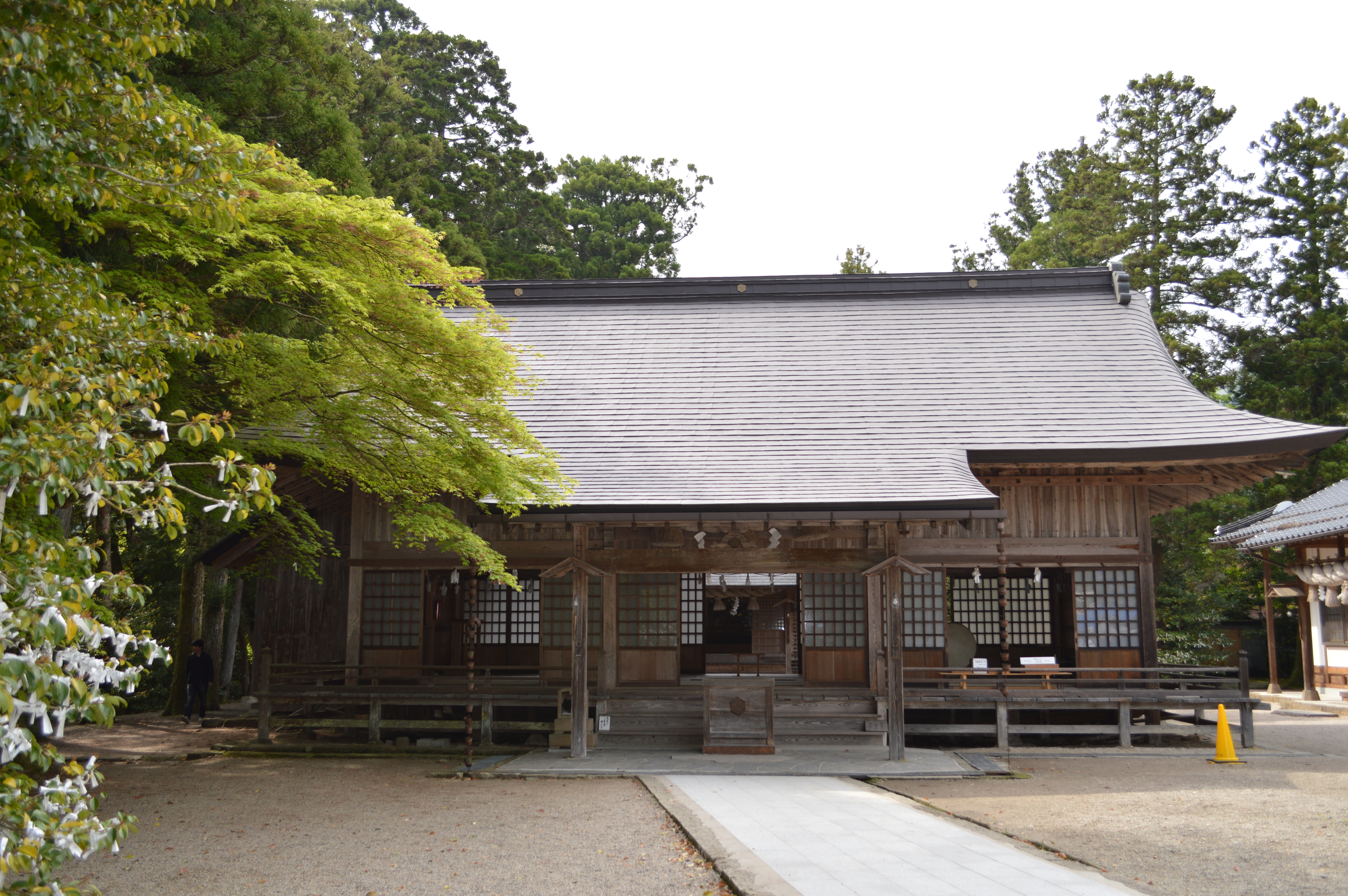 須佐神社の拝殿